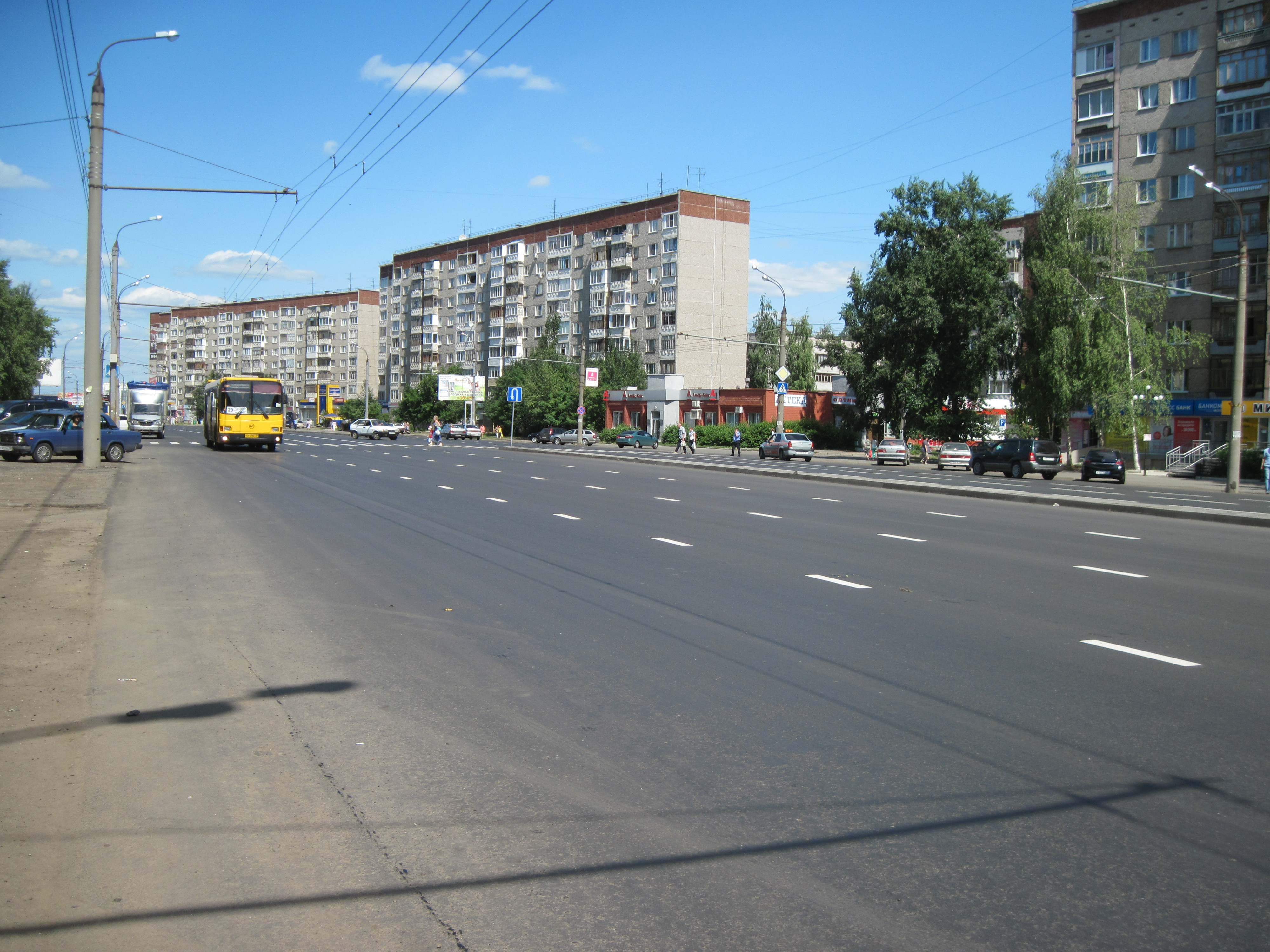 Бывшая взлетная полоса аэропорта.